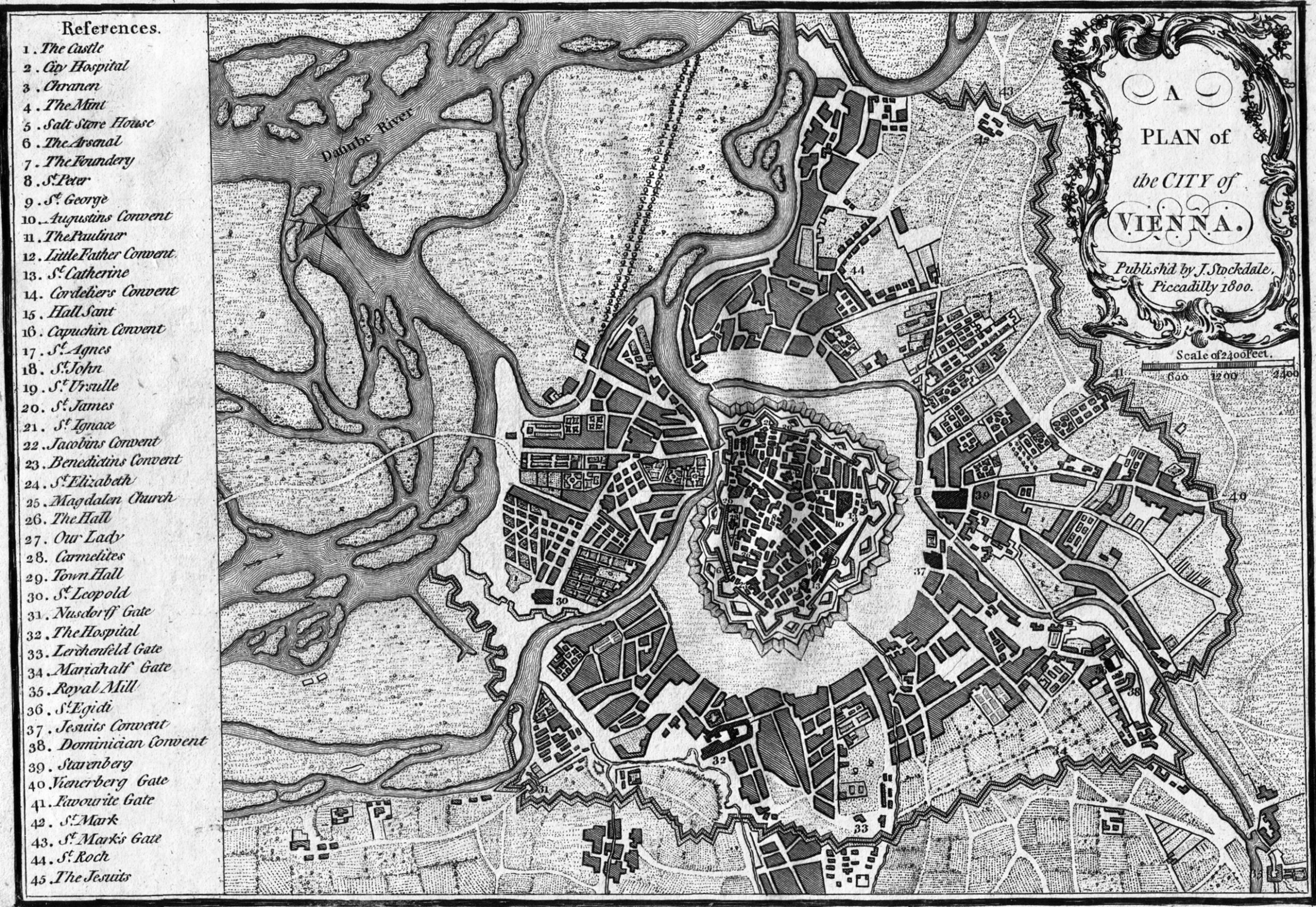 Wien Karte um 1800